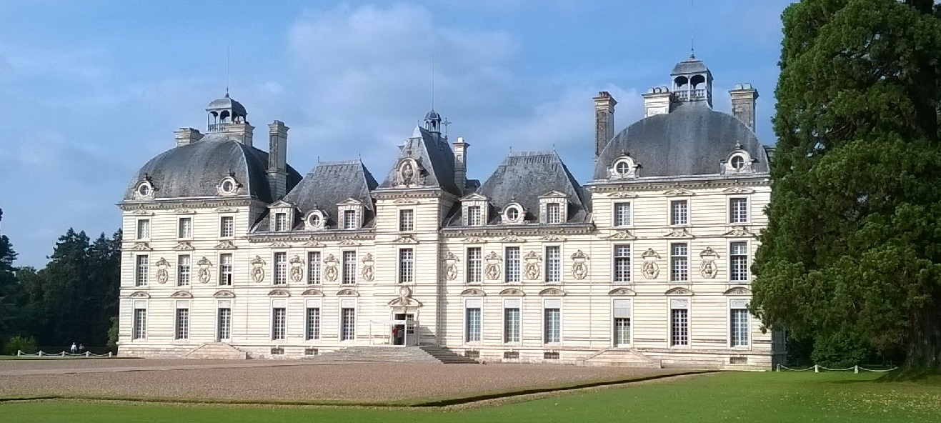 Přední fasáda zámku Château de Cheverny